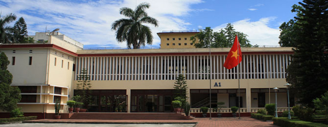 Nhà A1 Viện Hàn lâm Khoa học và Công nghệ Việt Nam